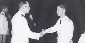 Juan Schiaretti egresa del Liceo Militar General Paz, con medalla de honor al mejor promedio